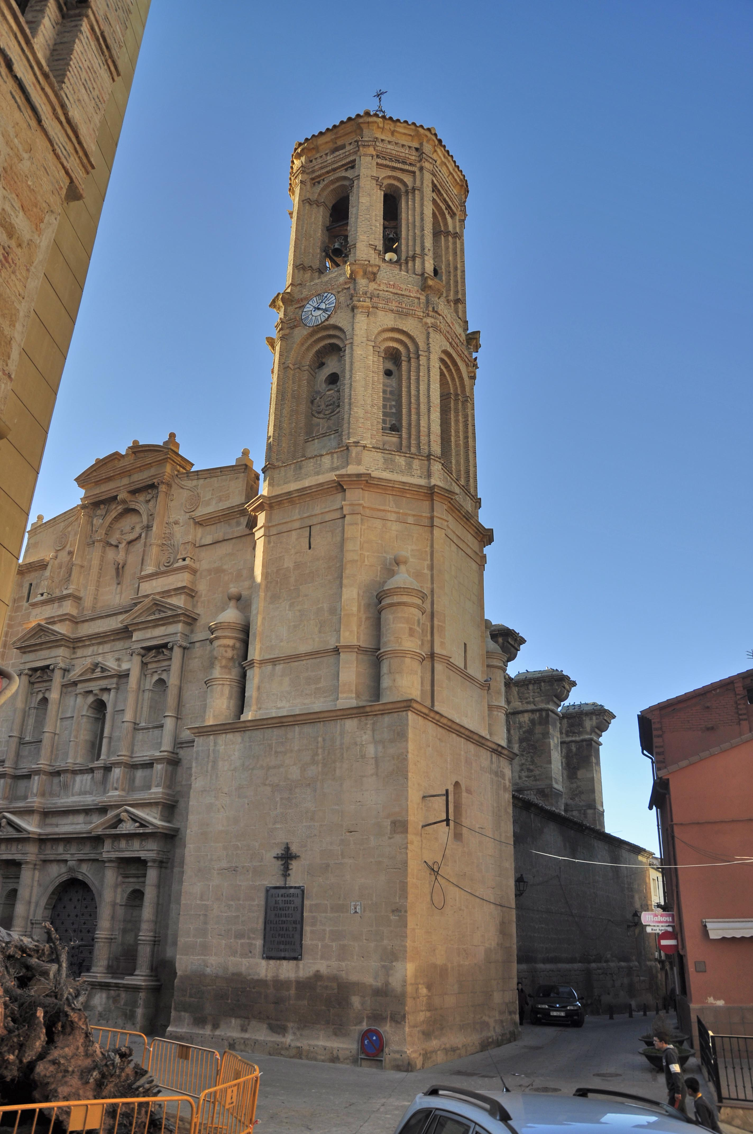 Se trata de un edificio de notables dimensiones, de nave única con capillas entre los potentes contrafuertes y cabecera recta al exterior y poligonal al interior. Fue construida entre finales del s.XVI y principios del s.XVII siguiendo un proyecto unitario. La fábrica está realizada en sillar de piedra arenisca, a excepción de la torre situada en el ángulo suroriental, que combina el sillar en sus dos cuerpos inferiores con el ladrillo en los dos superiores, fruto de una ampliación de mediados del s.XVII. En esta torre se combinan la planta cuadrada del primer cuerpo con la octogonal de los restantes, haciéndose la transición por medio de torreoncillos de ángulo. Asimismo se combinan elementos de un incipiente barroco con otros de tradición mudéjar. Al exterior destaca la fachada monumental realizada en clave manierista. Se trata de una portada-retablo articulada en dos pisos separados por un entablamento y coronados por un ático cerrado por un frontón mixtilíneo que cobija la imagen de un crucificado.